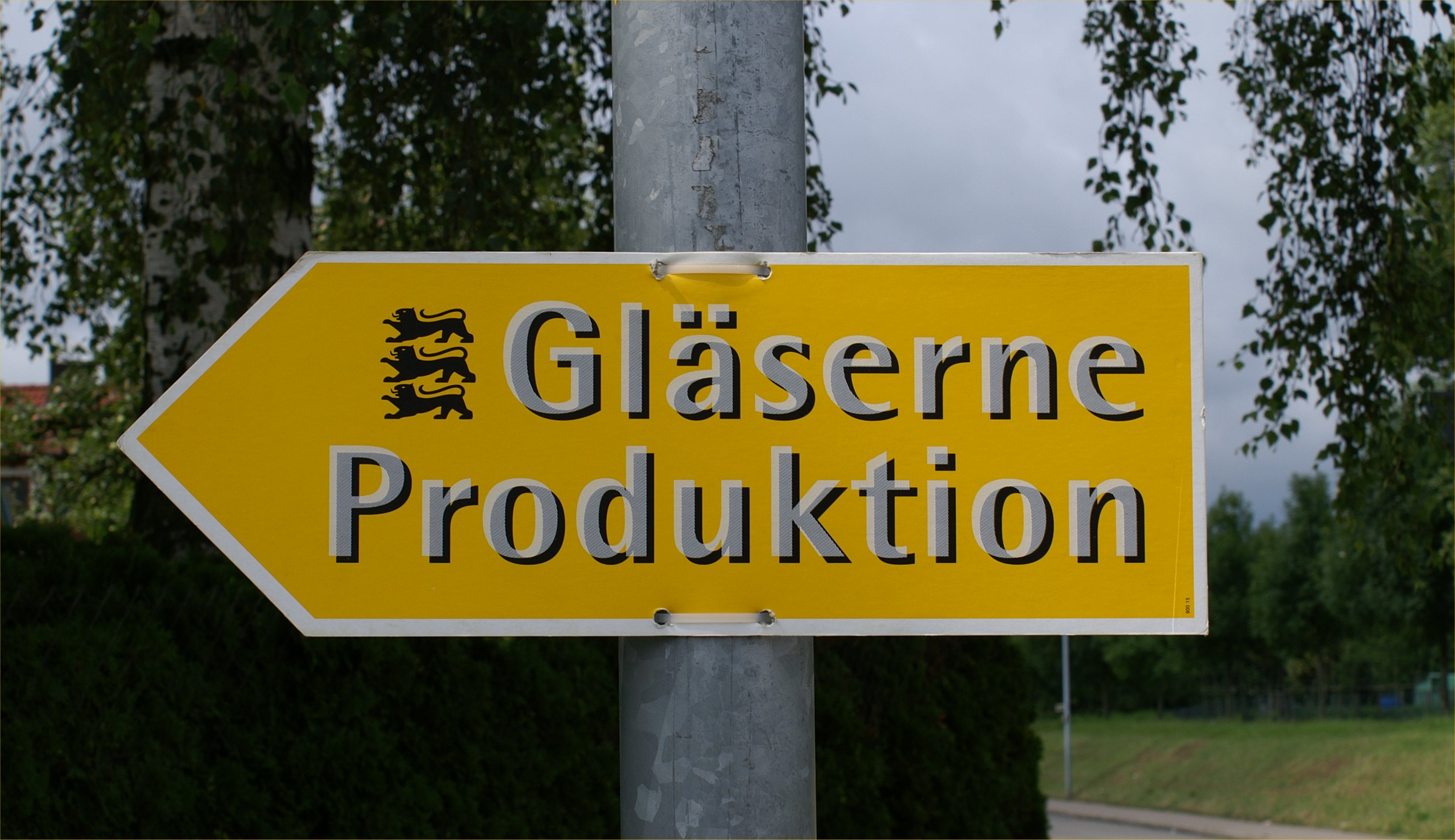 Bei der Gläsernen Produktion öffnen landwirtschaftliche Betriebe in Baden-Württemberg ihre Türen für interessierte Besucher